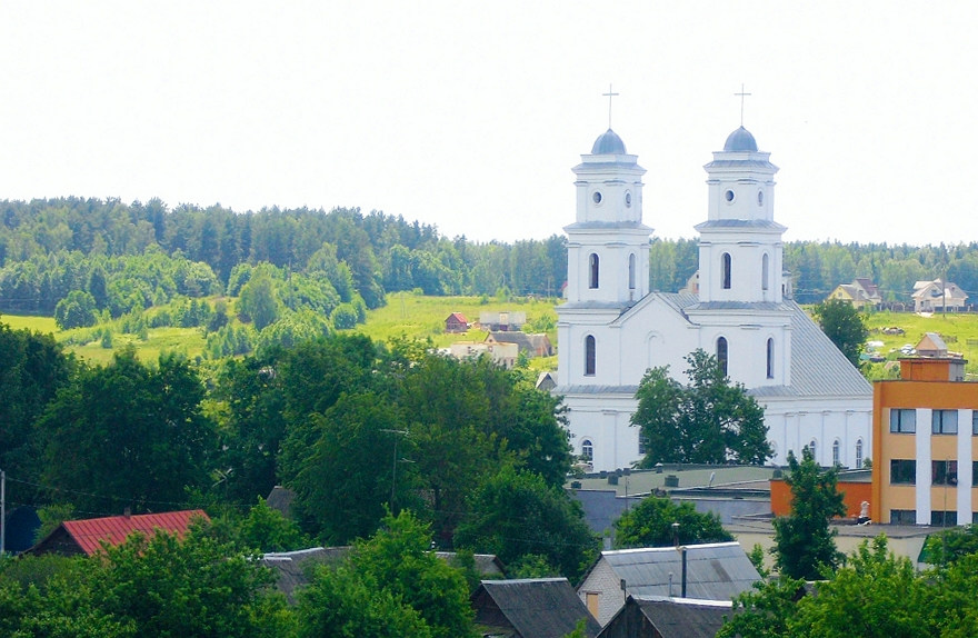 Краявід Радашковічаў